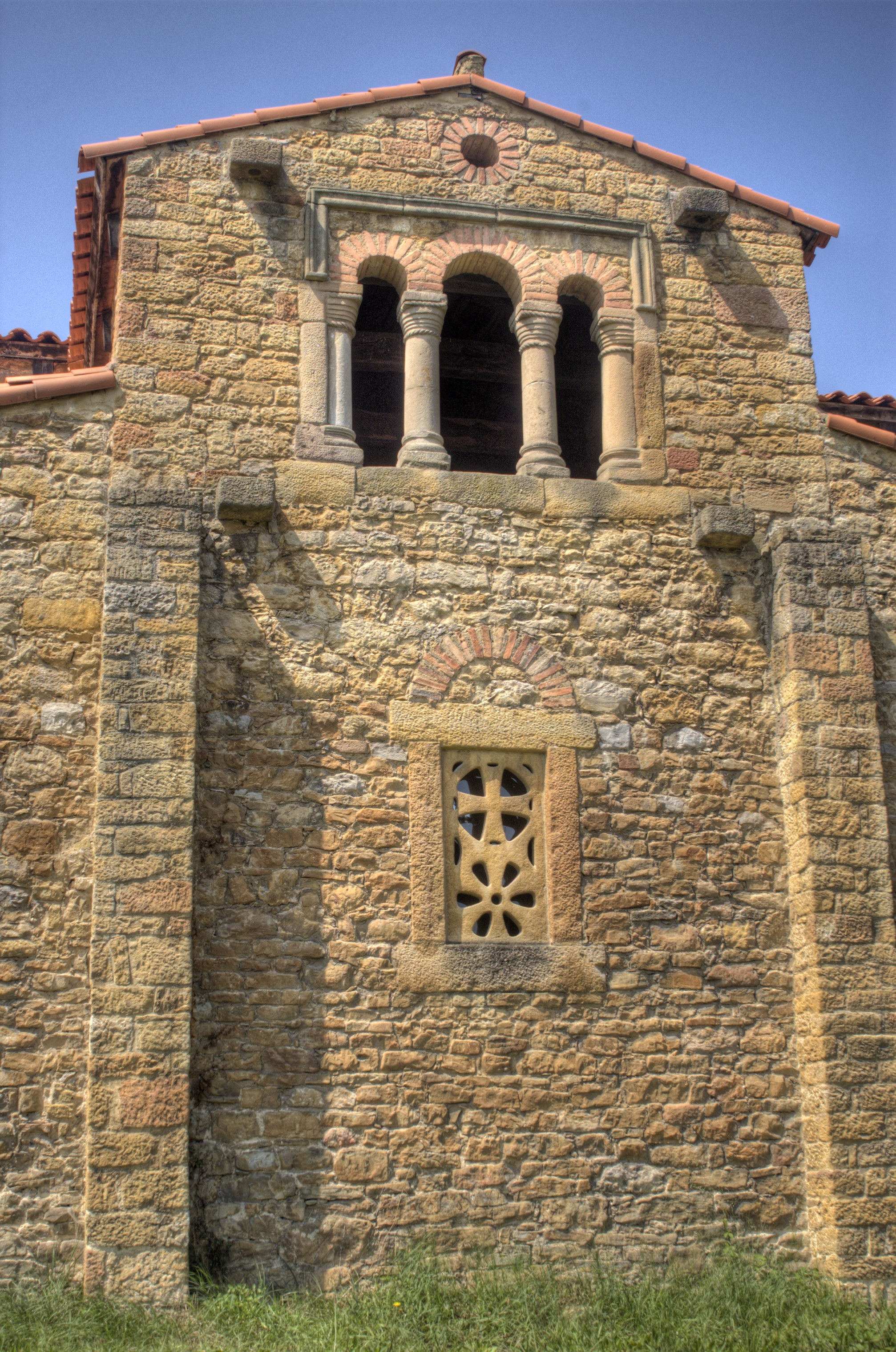 Iglesia del siglo IX, sin datos sobre la fecha exacta de su construcción.